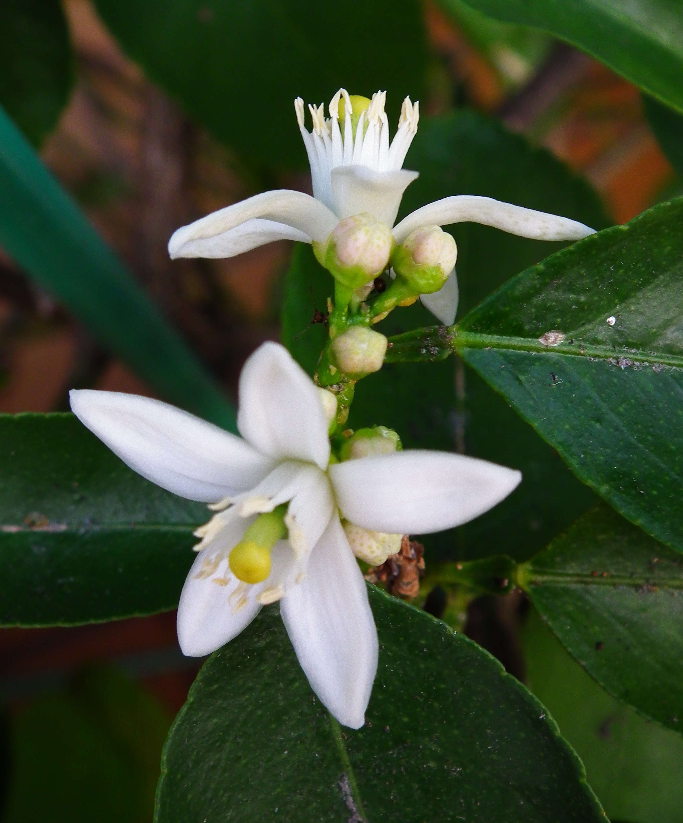 Blüten an einem Zitronenbaum (Citrus x limon), daneben eine Schildlaus (Coccoidea)